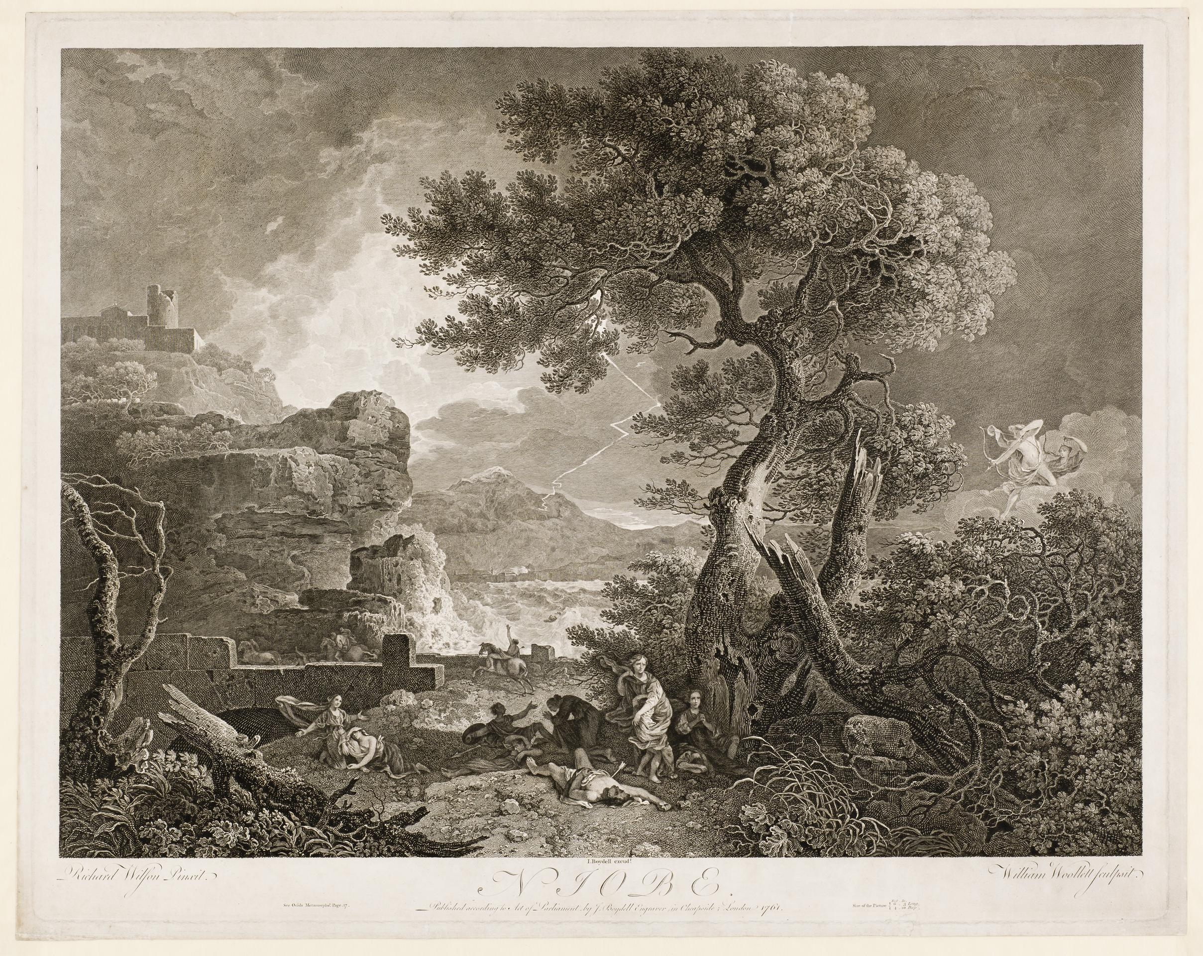 The Destruction of the Children of Niobe, gravure de William Woollett d'après le tableau du même nom de Richard Wilson. Musée national du pays de Galles, inv. NMW A 11412.